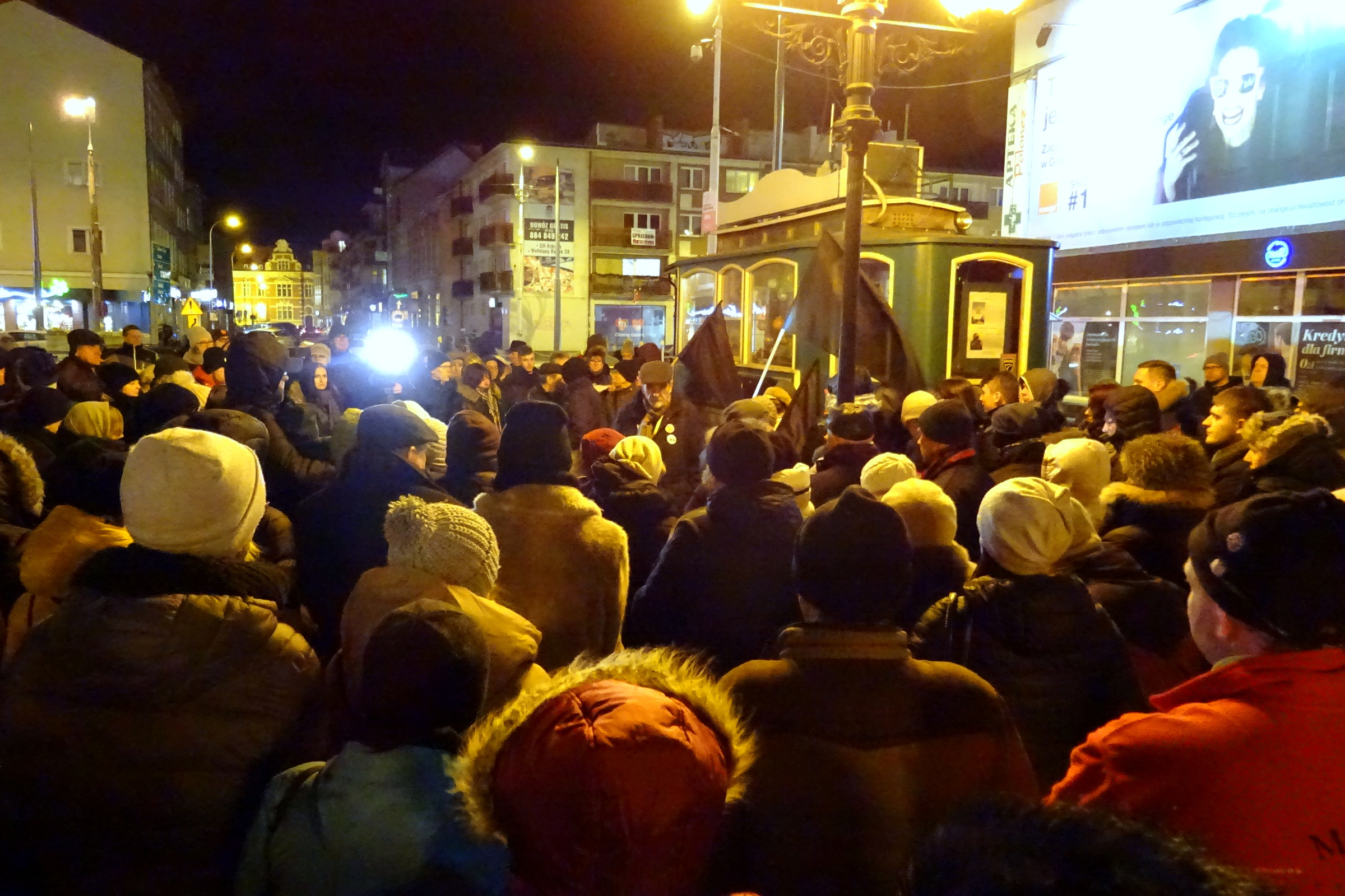 14.01.2019 r. Gorzów Wlkp. Wiec przeciwko nienawiści i przemocy po śmierci prezydenta Gdańska Pawła Adamowicza